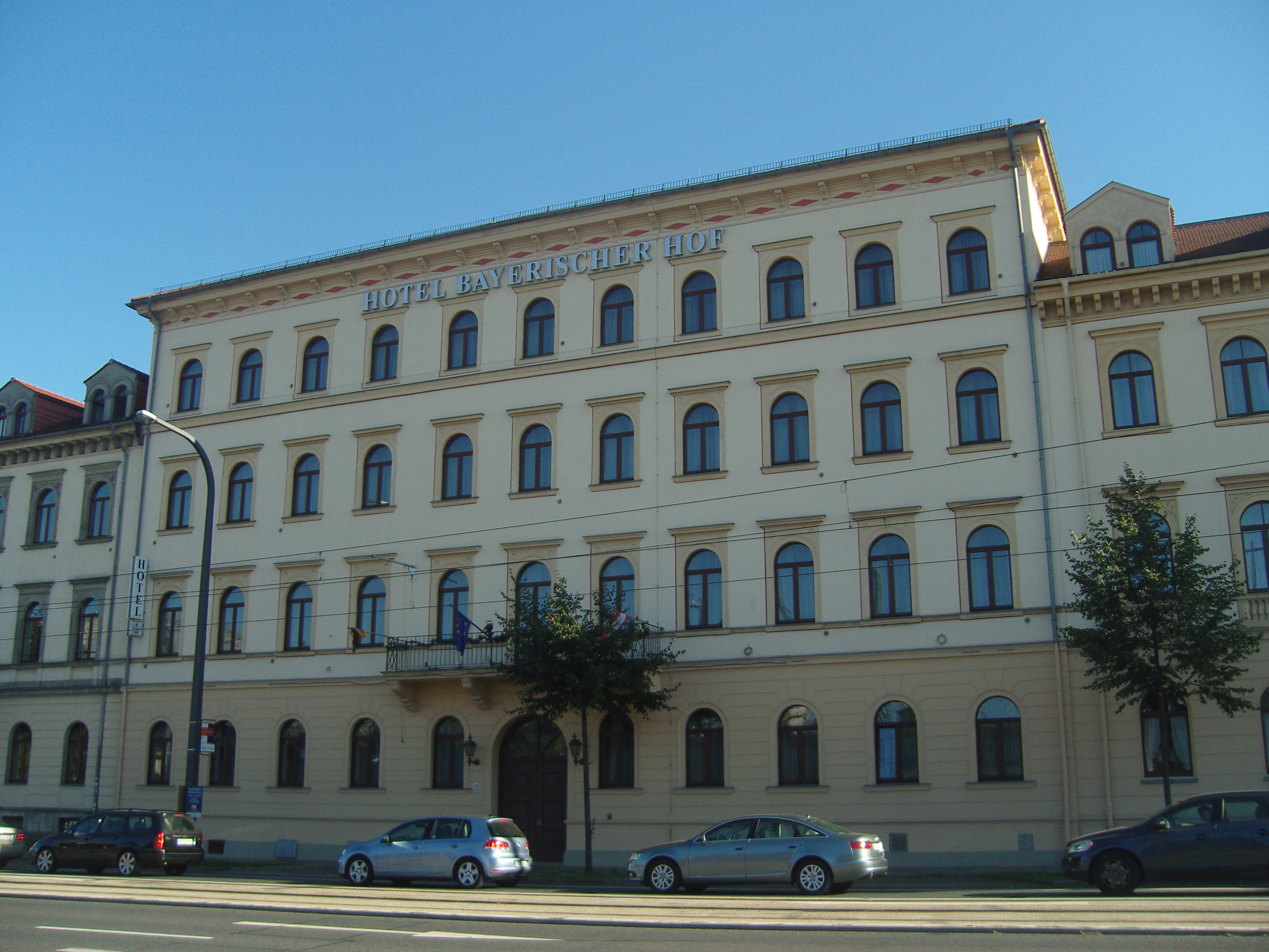 Denkmalgeschütztes Hotel Bayrischer Hof in der Antonstraße 33 in Dresden